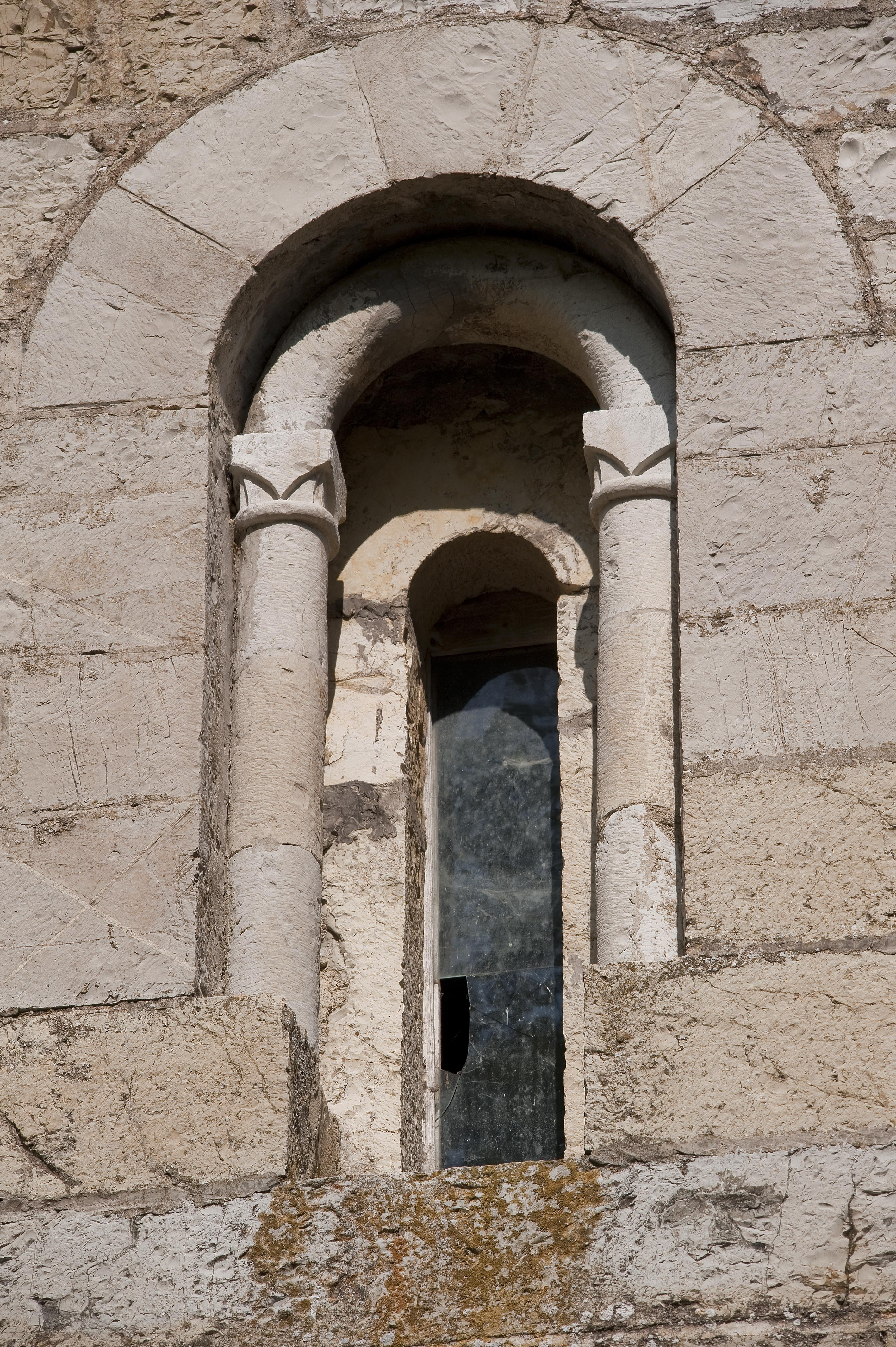 Monofora posta sulla facciata della chiesa di San Martino a Cispiano, Castellina in Chianti